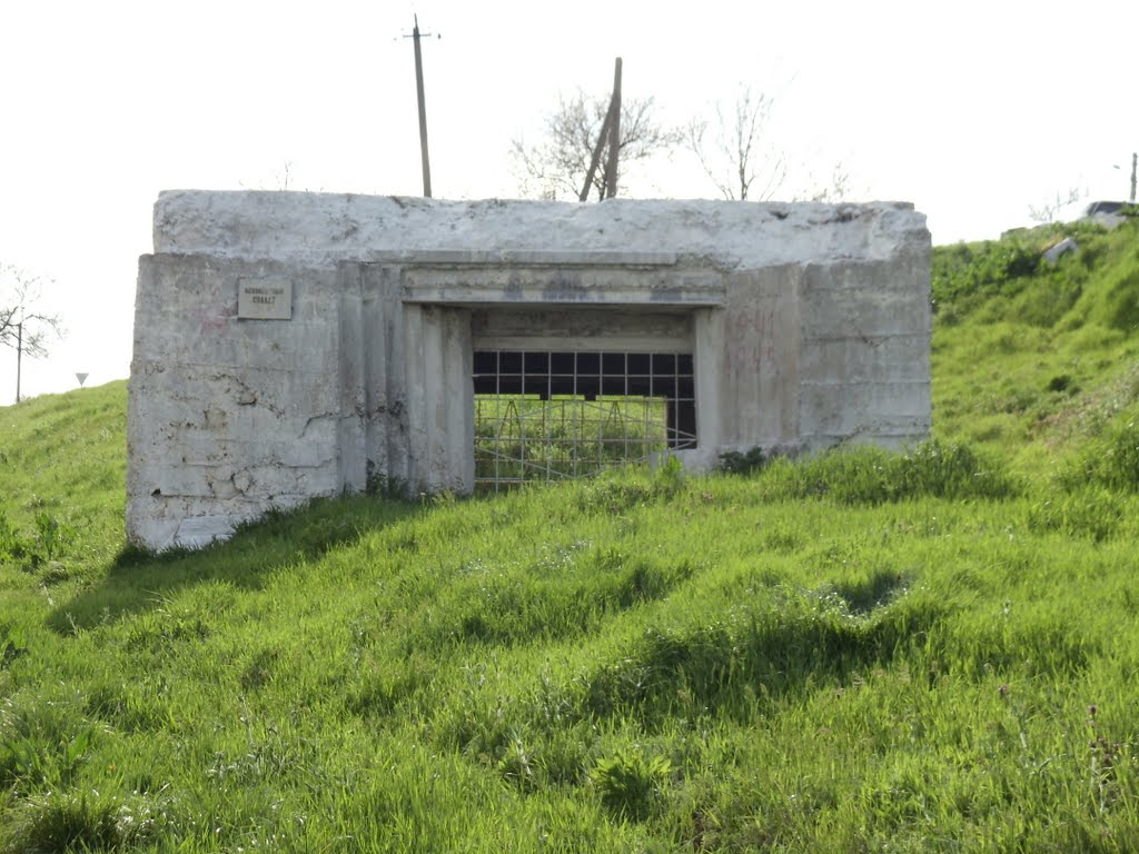 Дот